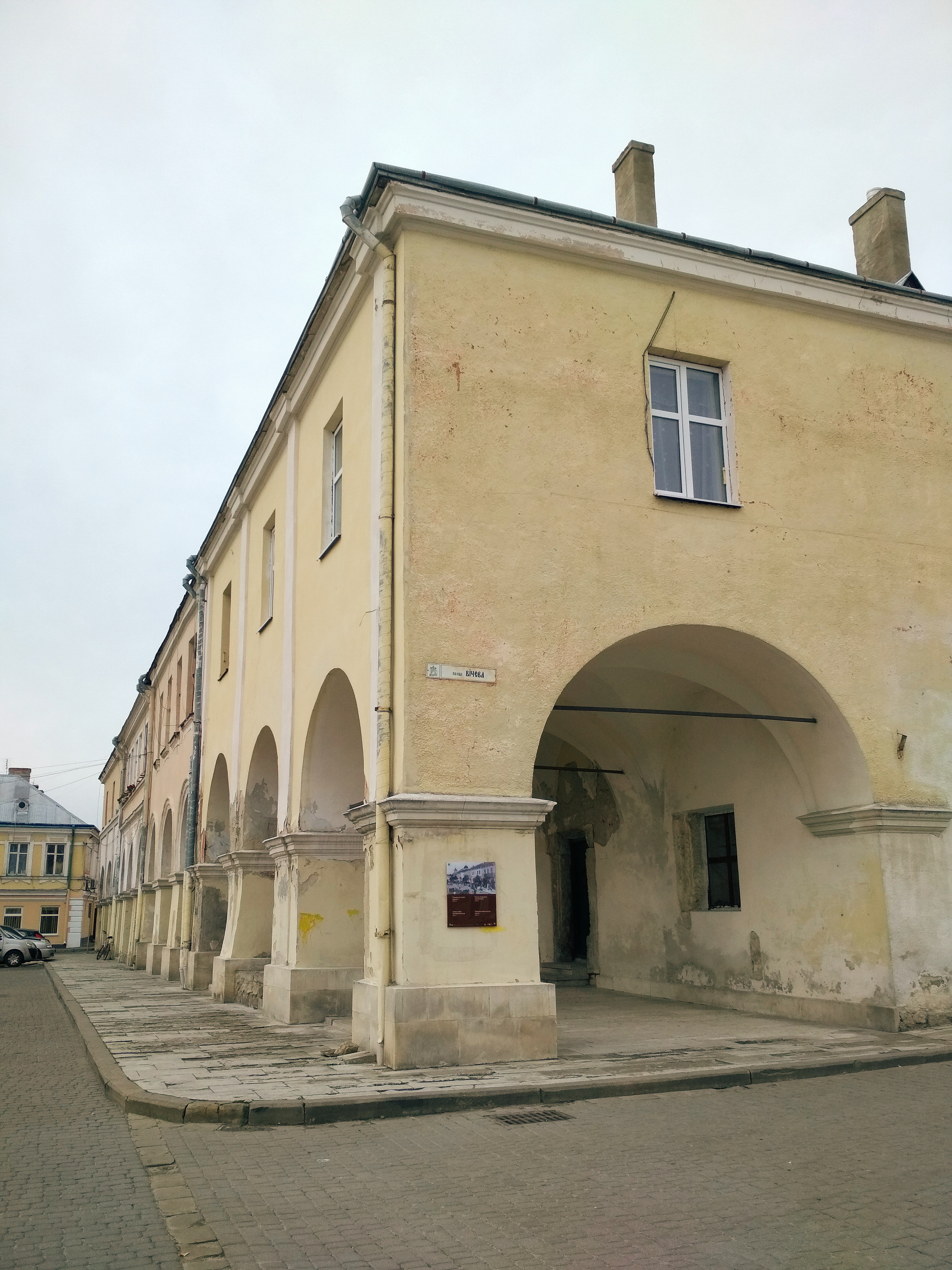 Żółkiew - Rynek